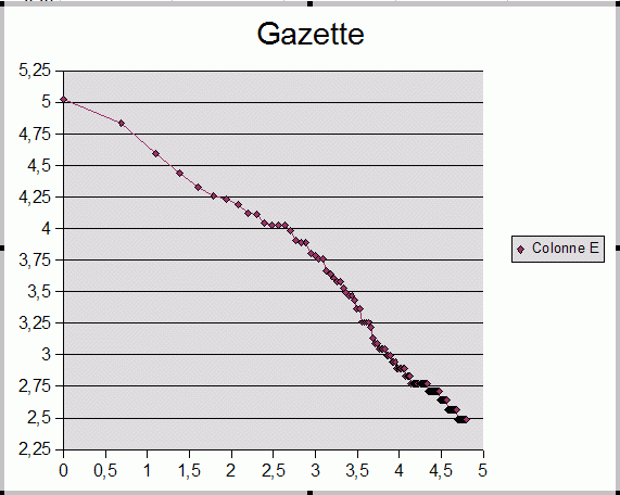 Exemple de courbe (loi de Mandelbrot) (Je ne sais pas encore comment la renommer) Extrait d'un corpus d'analyse personnelle effectué sur mon temps libre, et que je rends donc libre de tout copyright ou droit d'auteur éventuel.